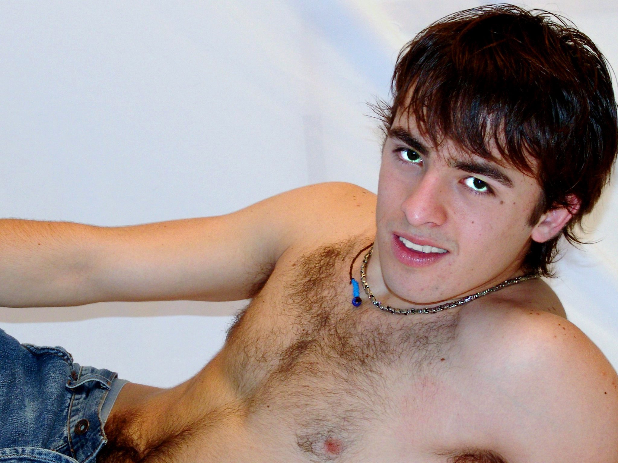 Martín Ricca no Brasil em 2006.